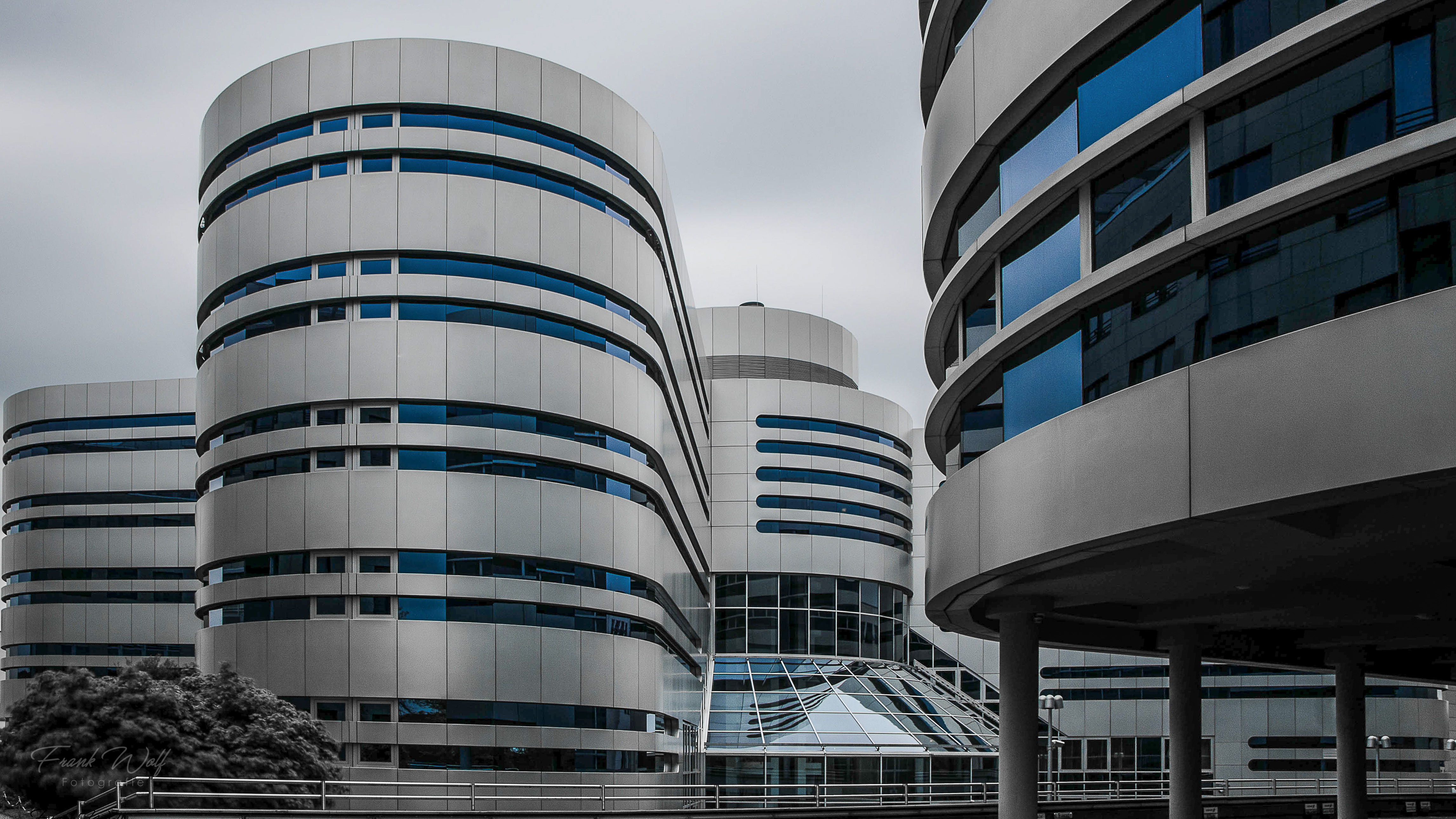 Futuristisches Firmengebäude